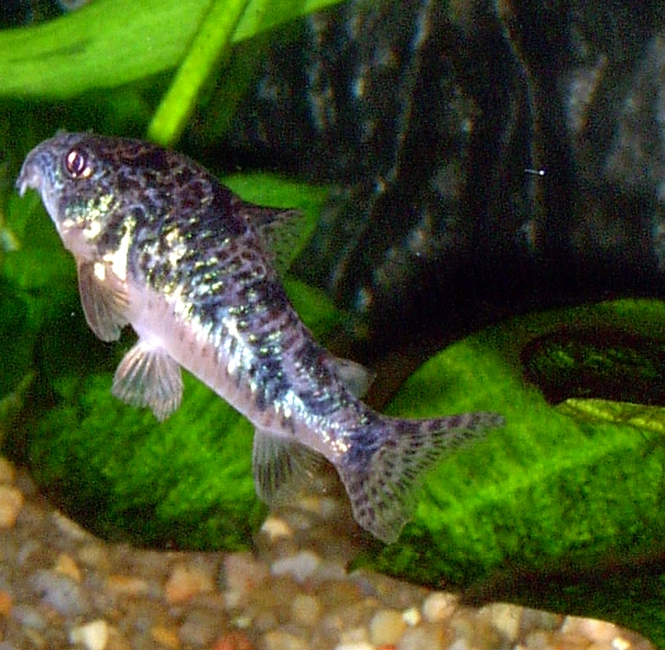 Corydora paleatus